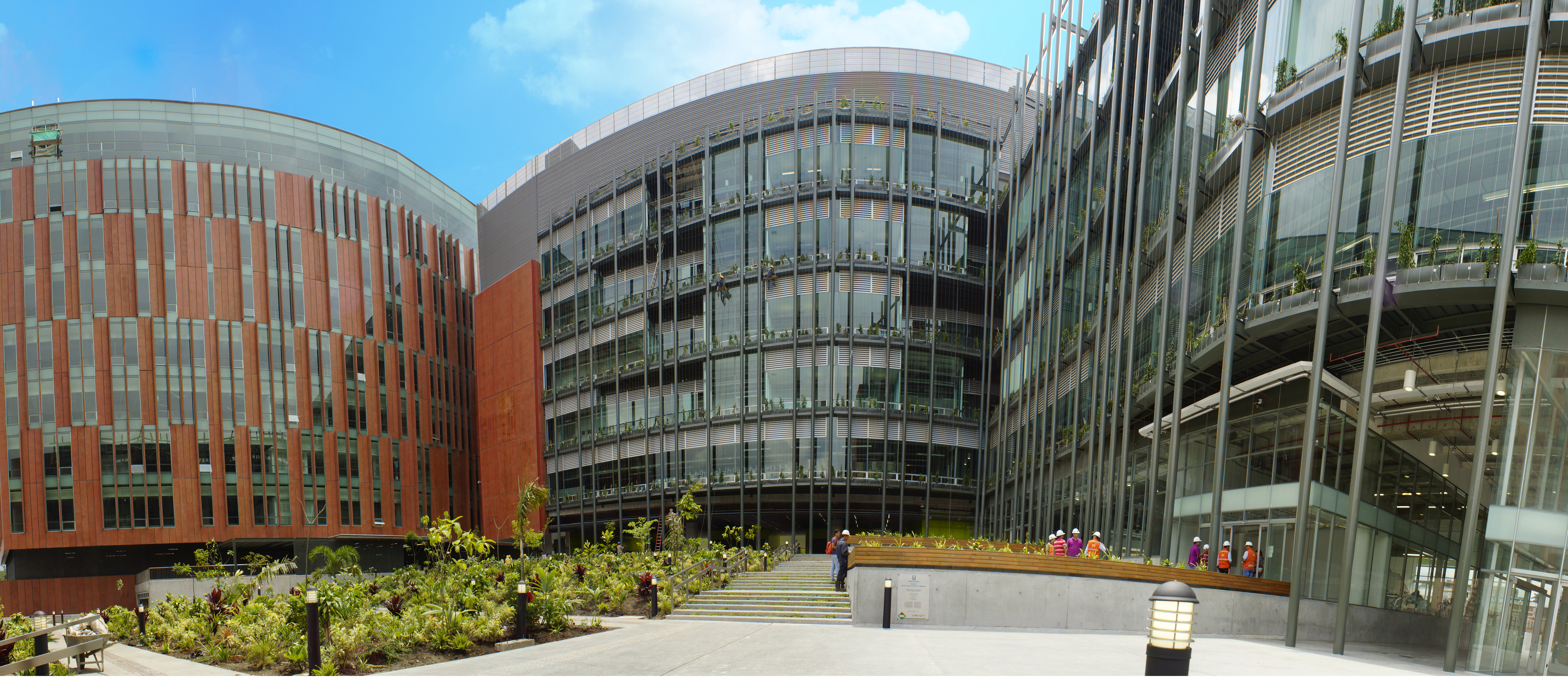 Ruta N medellin (panoramica)